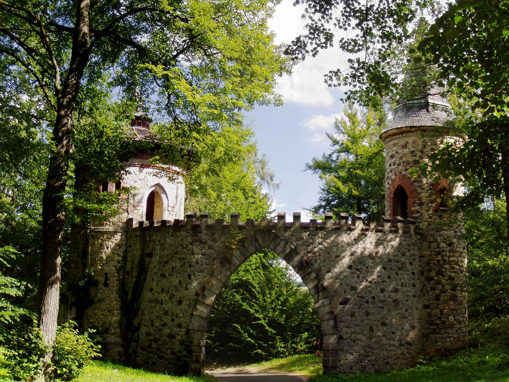 Arturuv hrad